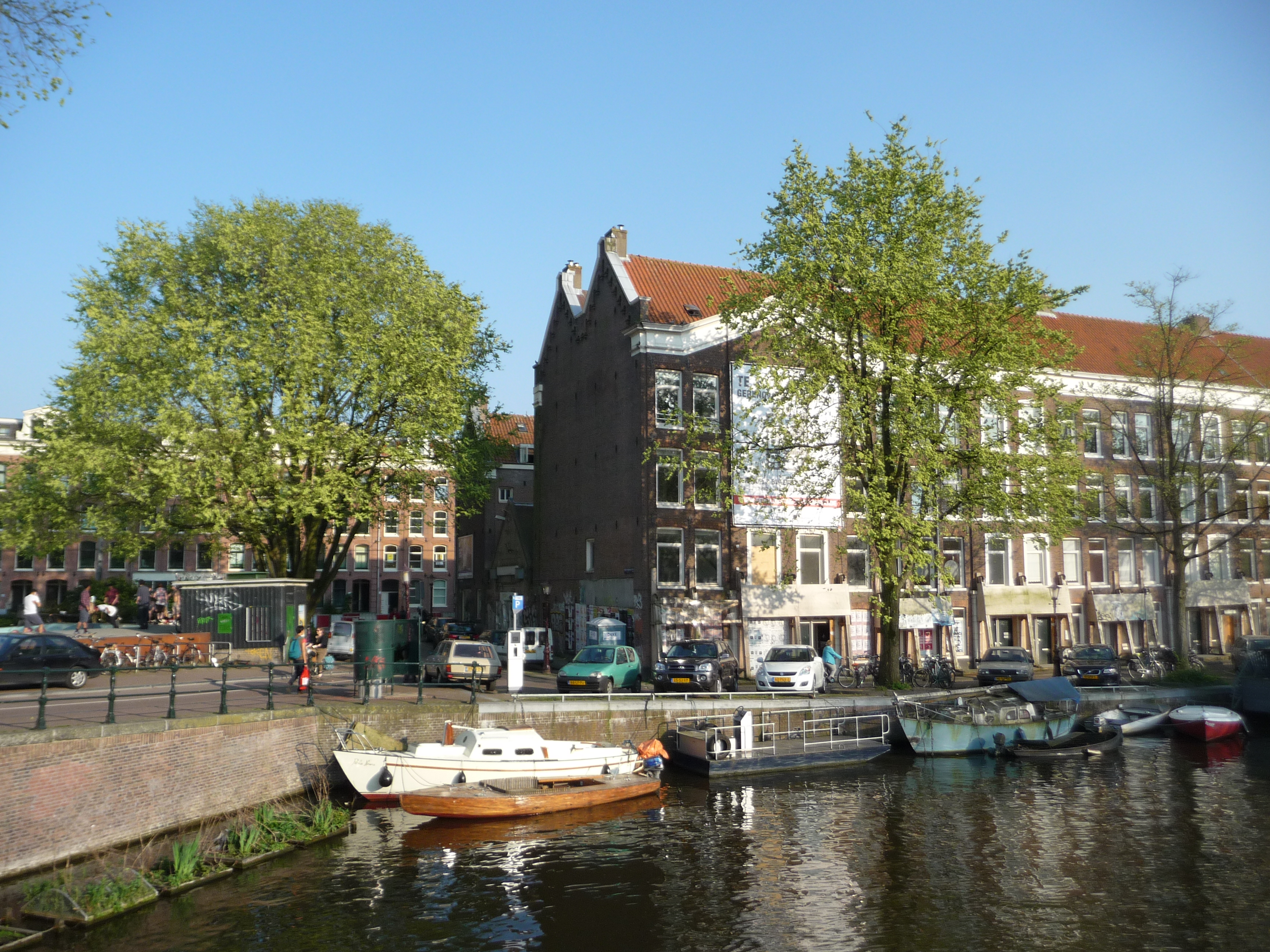 Cascowoningen, te koop als casco- en afbouwwoningen van woningcorporatie Ymere en Era Contour van project Een Blok Stad aan de Marnixkade 33-38 te Amsterdam.